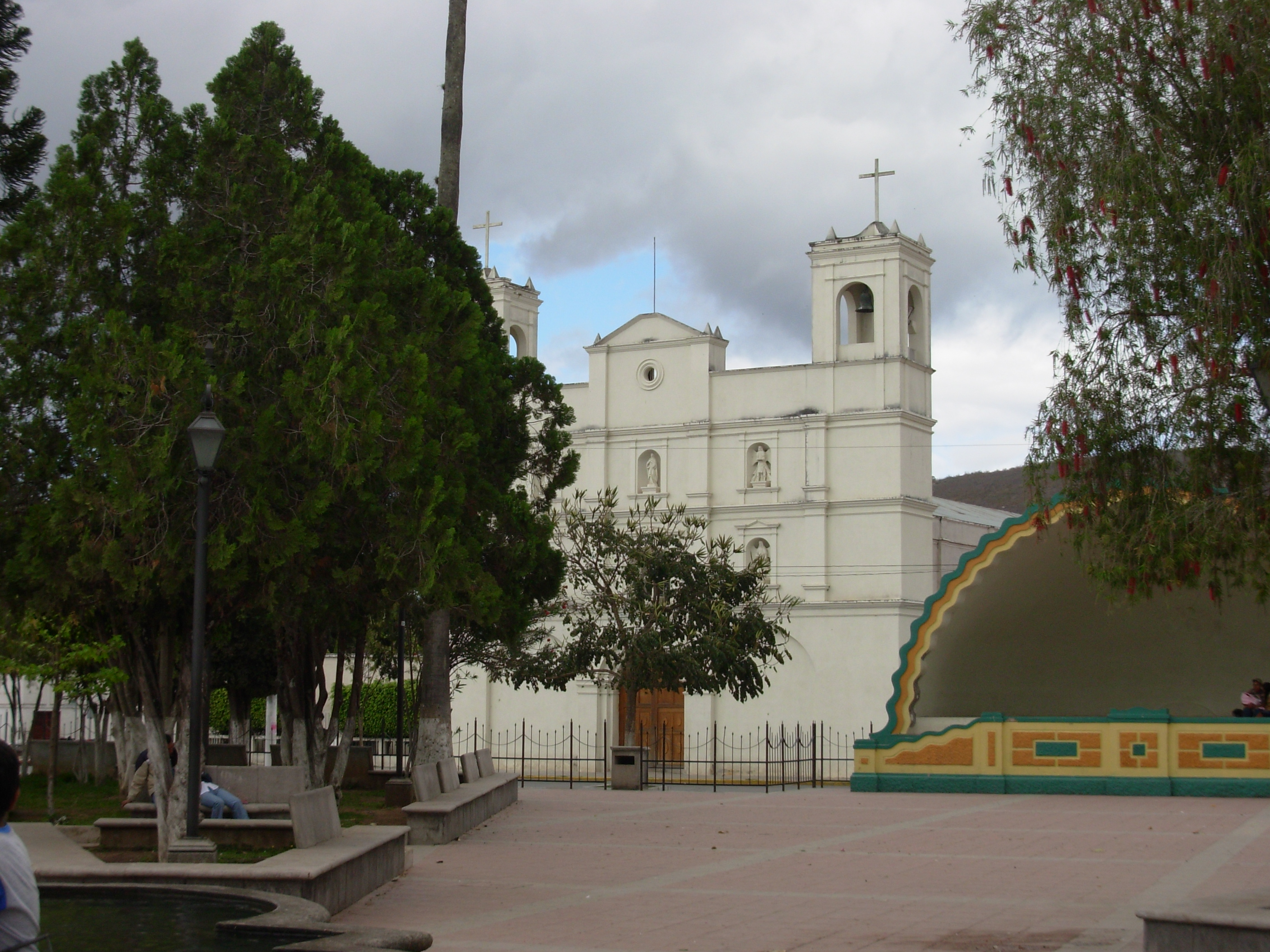 Templo catolico principal de Jalapa.